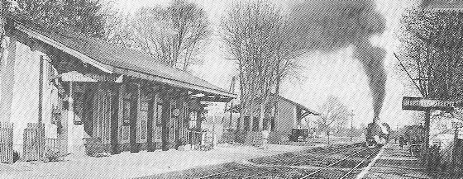 Gare de Montigny-sur-Loing (Seine-et-Marne, France), au début du XX° siècle.